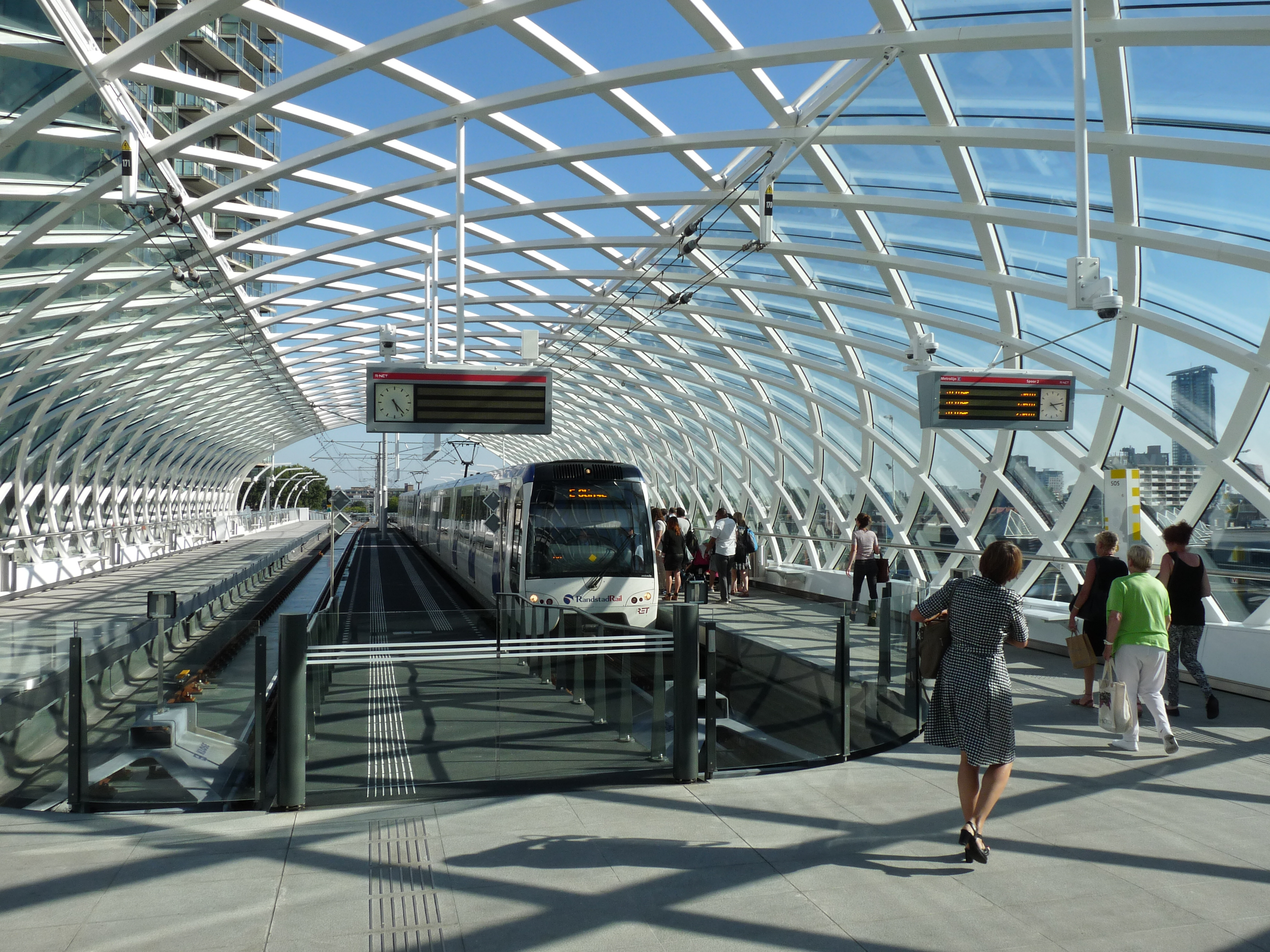 De Rotterdamse metro die aankomt in Den Haag CS bij de nieuwe eindhalte.